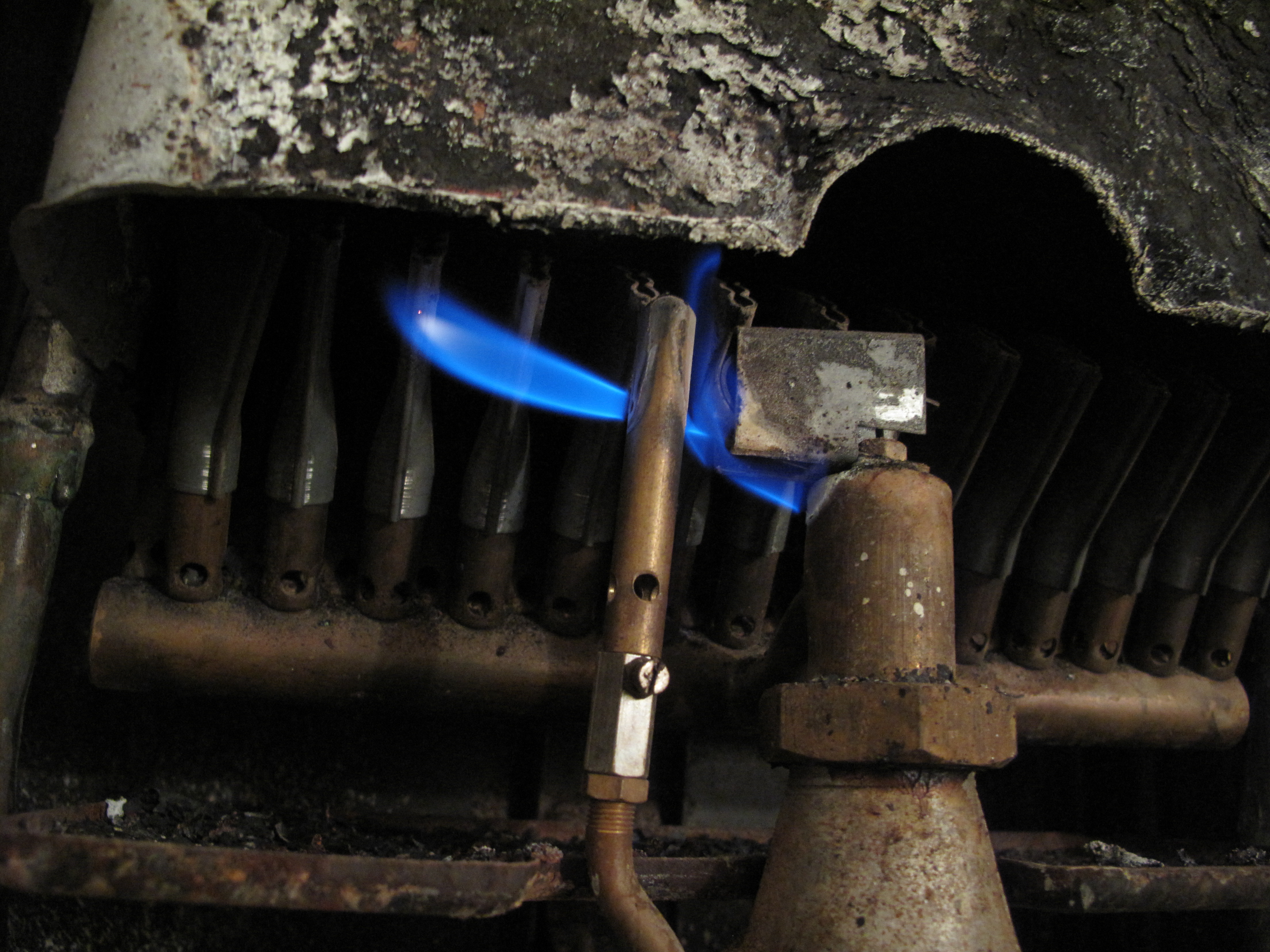 Karma Mora typ PO 35 a její části.